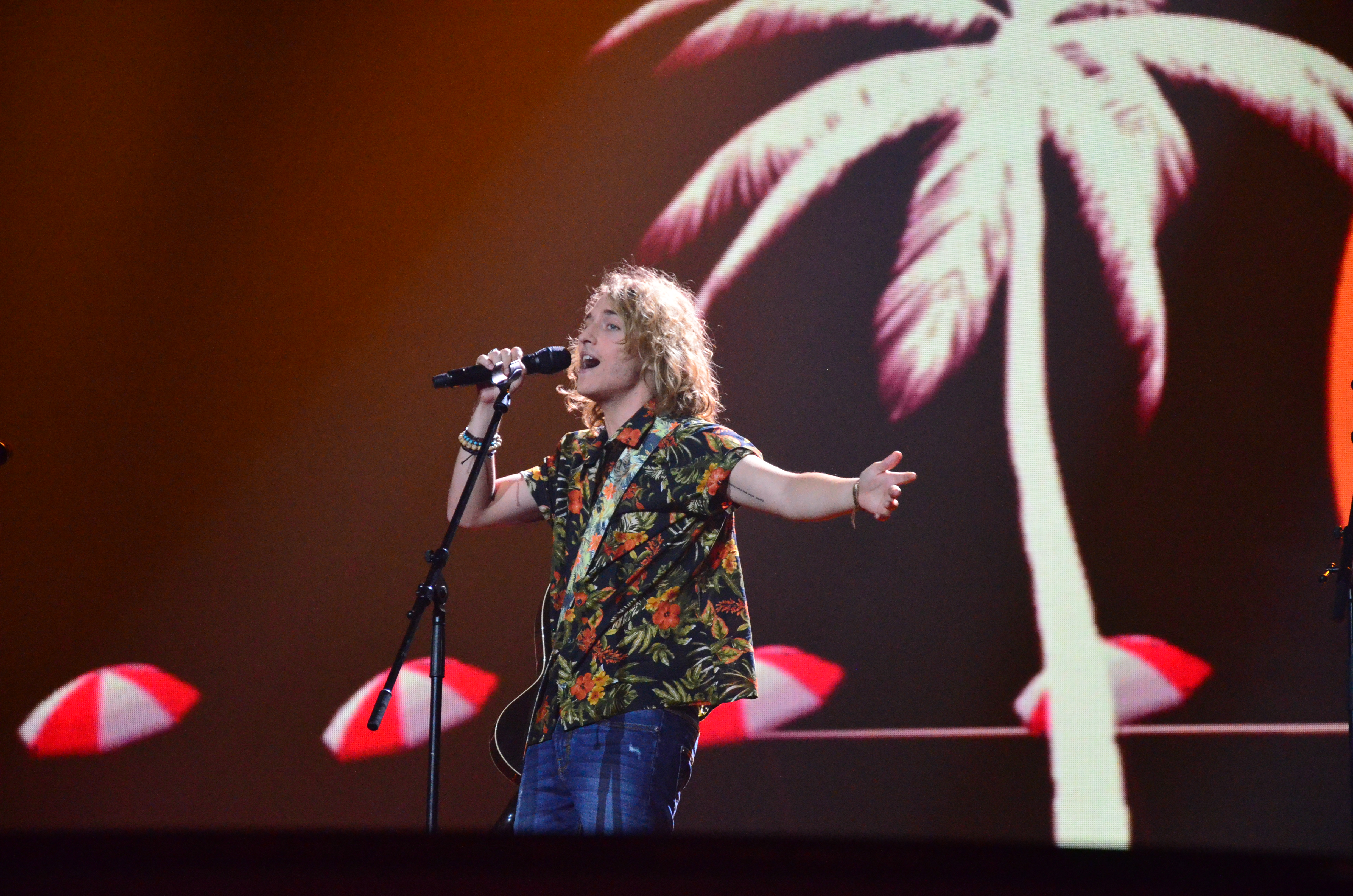 12 травня. Генеральна репетиція фіналу Євробачення 2017. Manel Navarro (Spain).